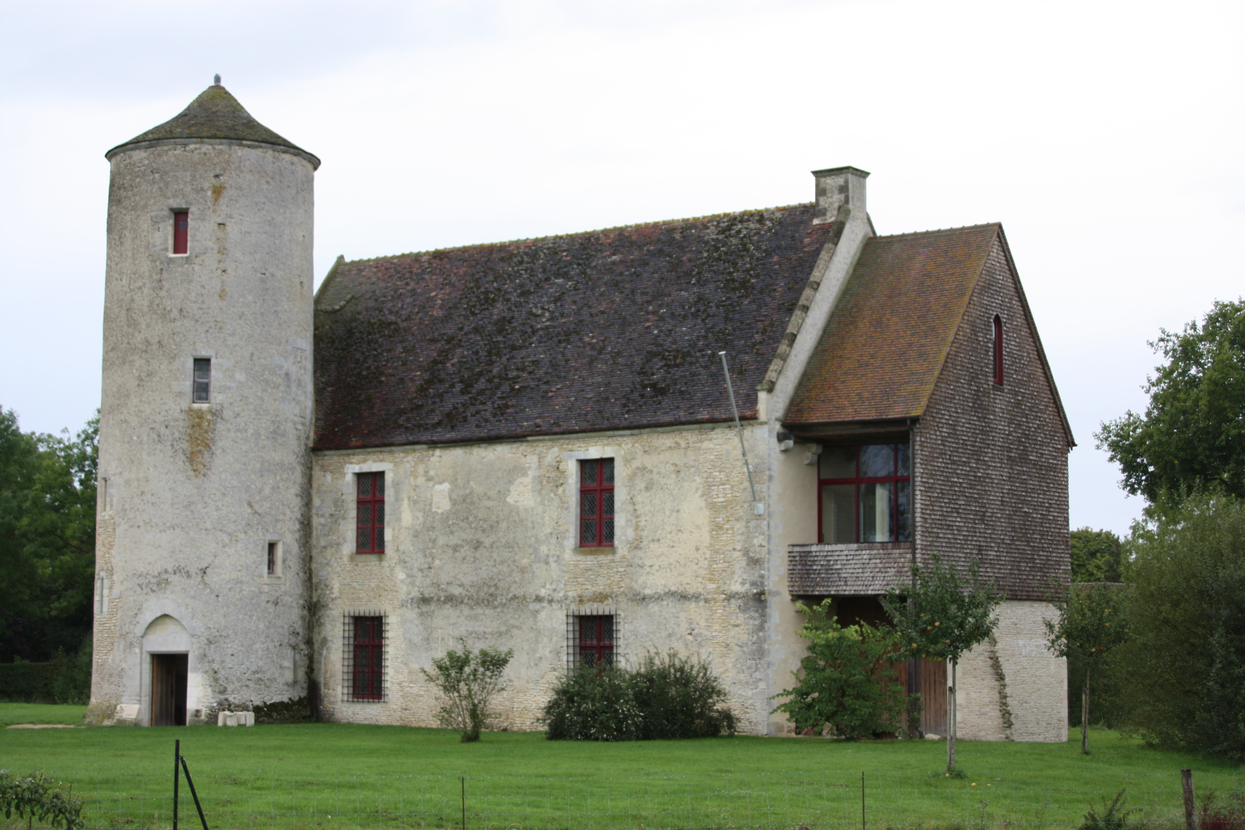 Aunou-le-Faucon tour aux anglais .